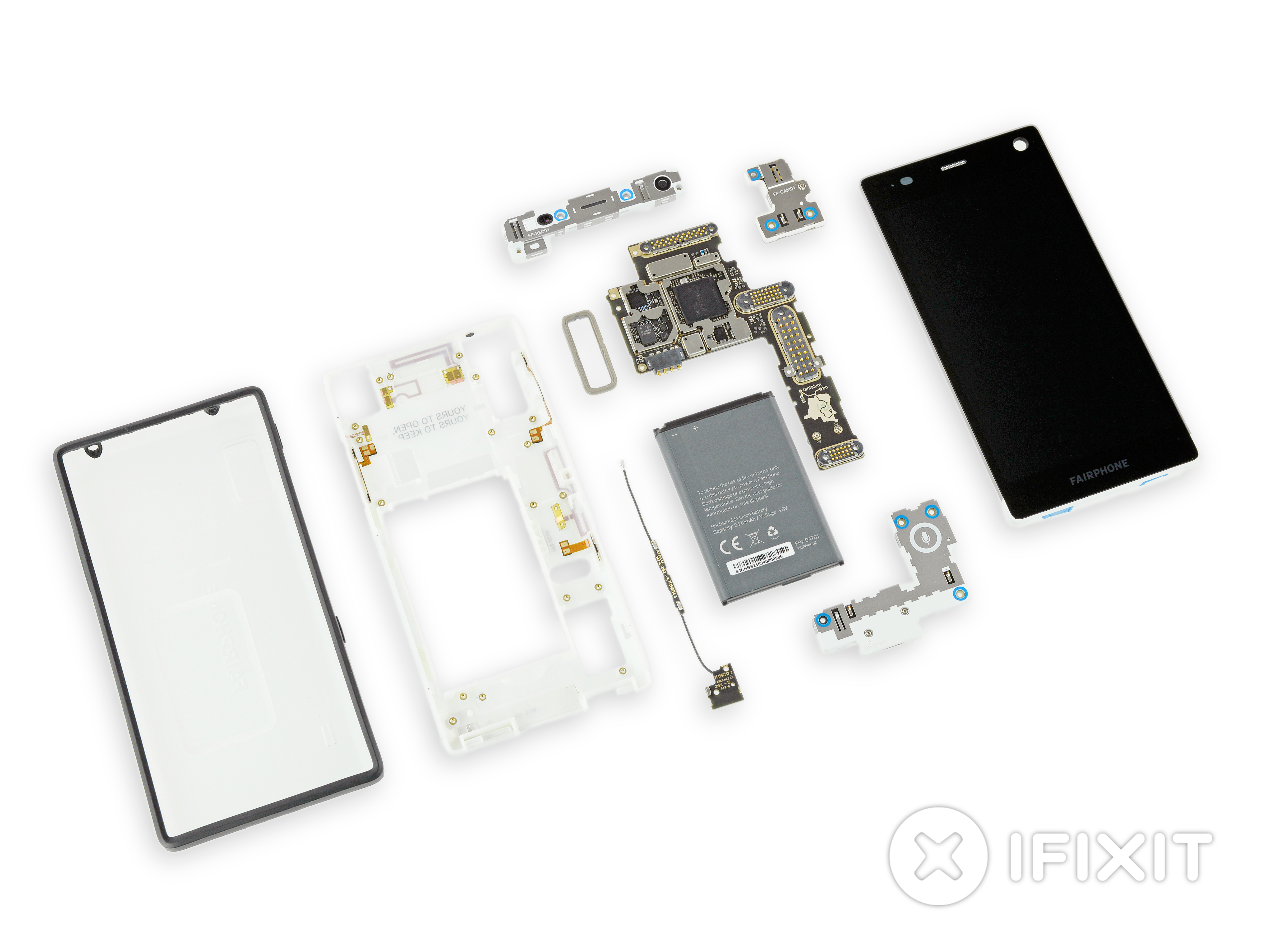 Taerdown du Fairphone 2 tel que montré sur